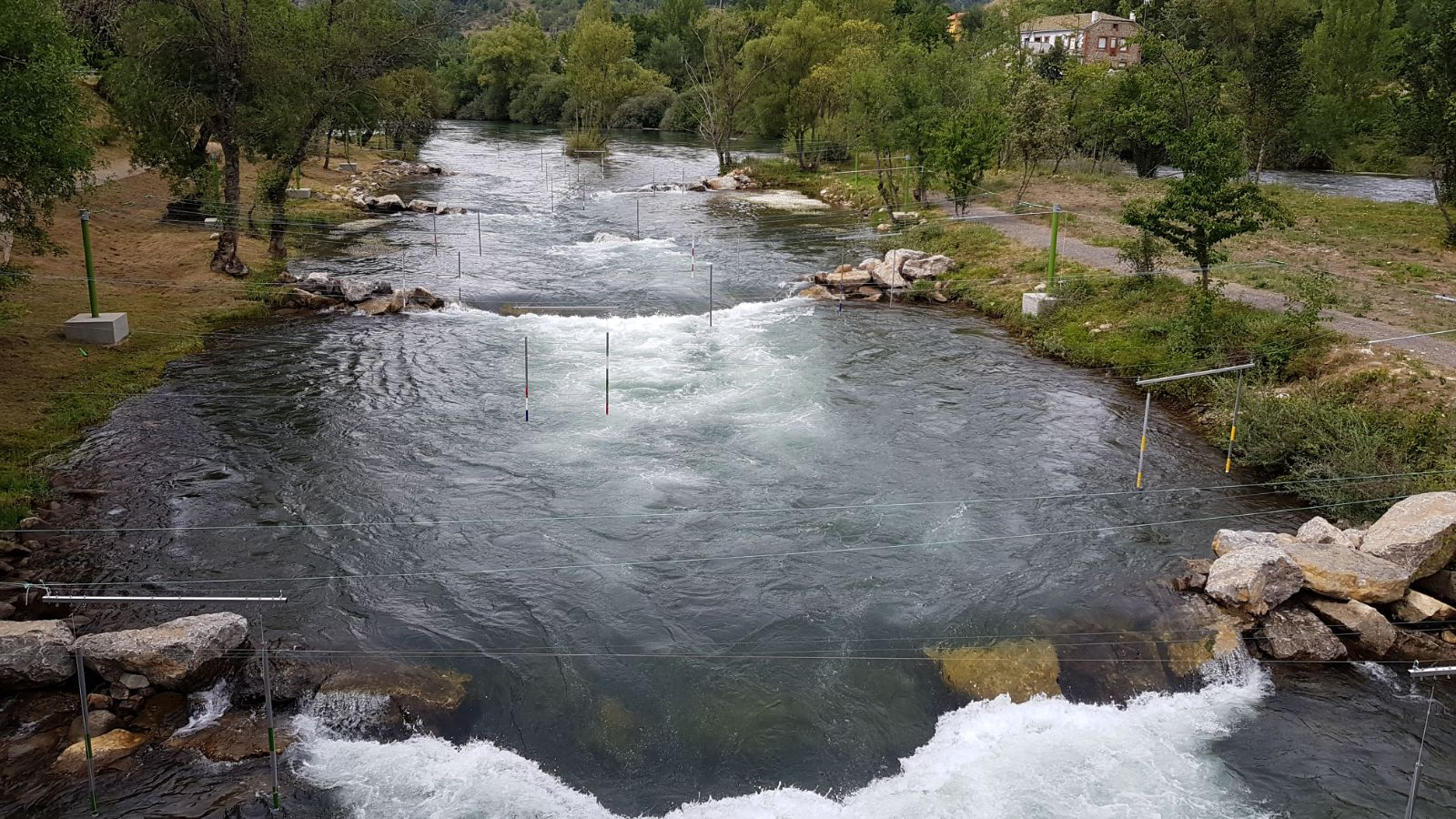 Sabero, León